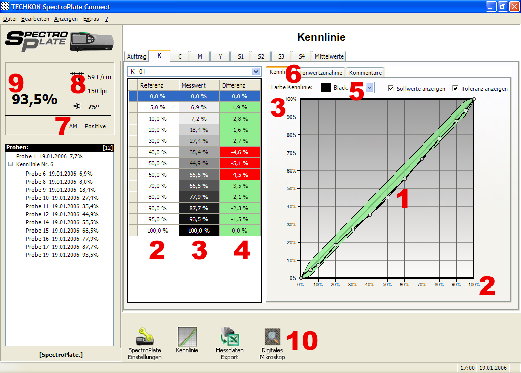 PC-Software für das Erstellen, Verwalten und Exportieren von Kennlinien. Kennlinie mit markierten Messpunkten und grünem Toleranzschlauch (1), Sollwerte (2), Istwerte (3), Soll-Ist-Differenzwerte (4), Zuordnung der Kennlinie zum Farbauszug (5), Wahl der Darstellung als Übertragungskennlinie – hier zu sehen – oder als Tonwertzuwachskennlinie (6), Identifizierung des Rastermodells (7), errechnete Rasterweite (8), errechneter Flächendeckungsgrad (9), Schaltflächen u.a. für den Datenexport an die RIP-Software oder zum Wechseln in den Digitalmikroskop-Modus (10).